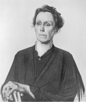 Portret van Henriette Roland Holst-van der Schalk, door M. de Klerk (1921).